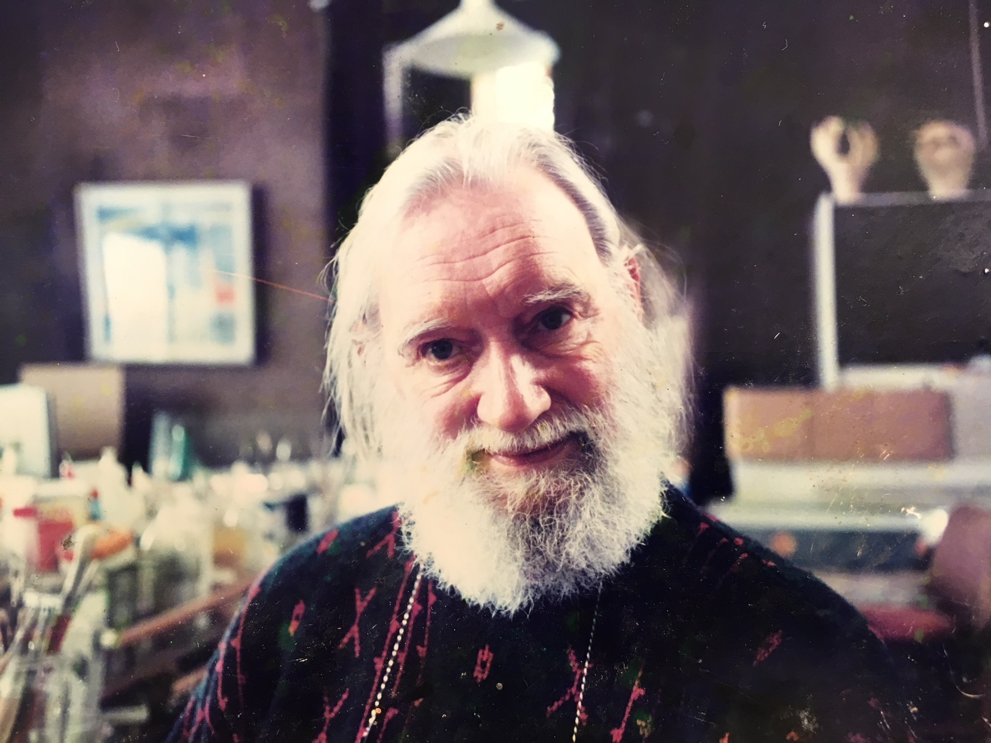 Pieter Kooistra